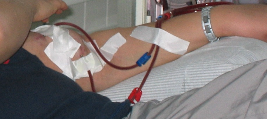 AV shunt kanylovaný dialyzačními jehlami